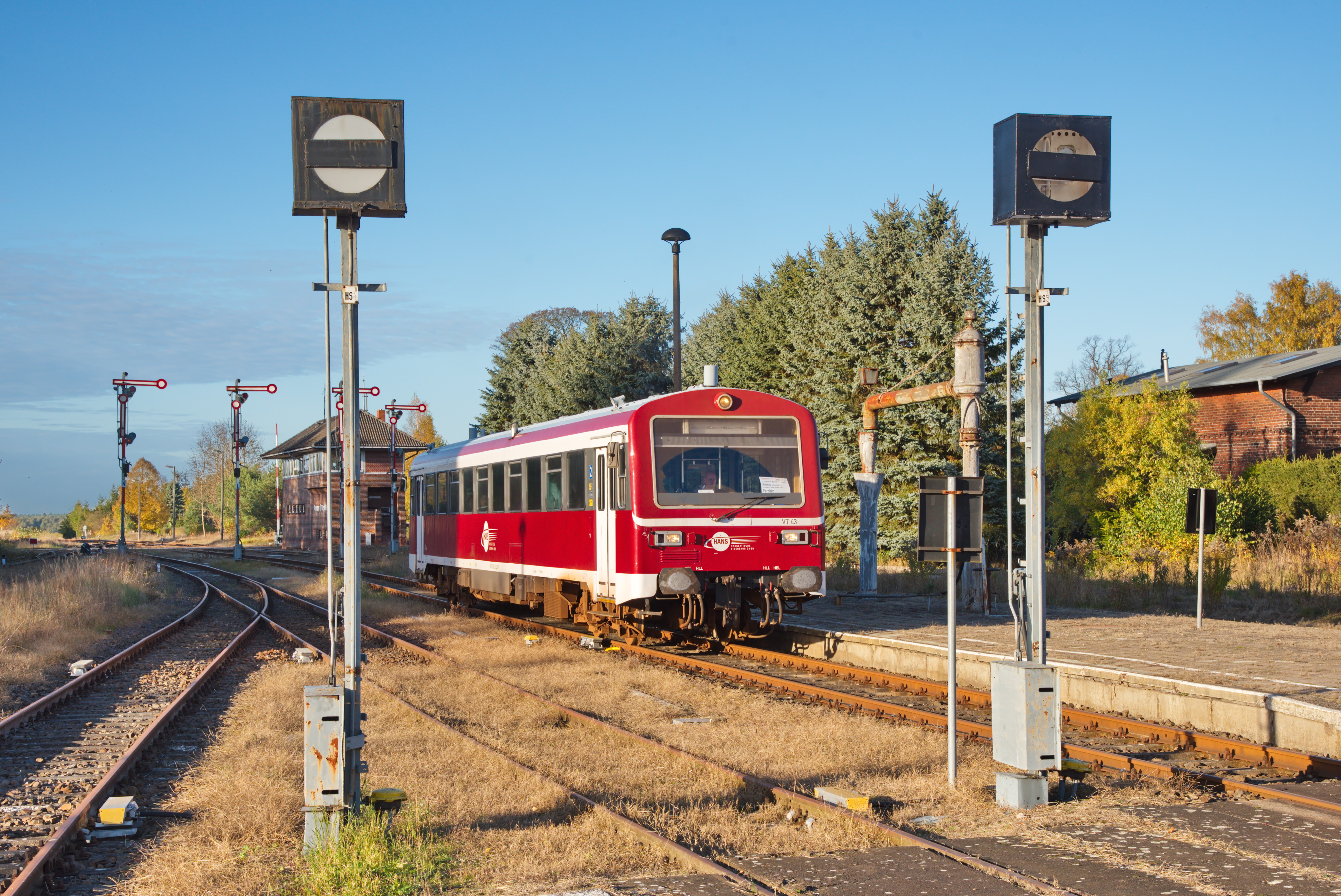 VT 43 (Typ NE 81) bei einer Sonderfahrt am 30.10.2016 im Bahnhof Karow (Meckl)